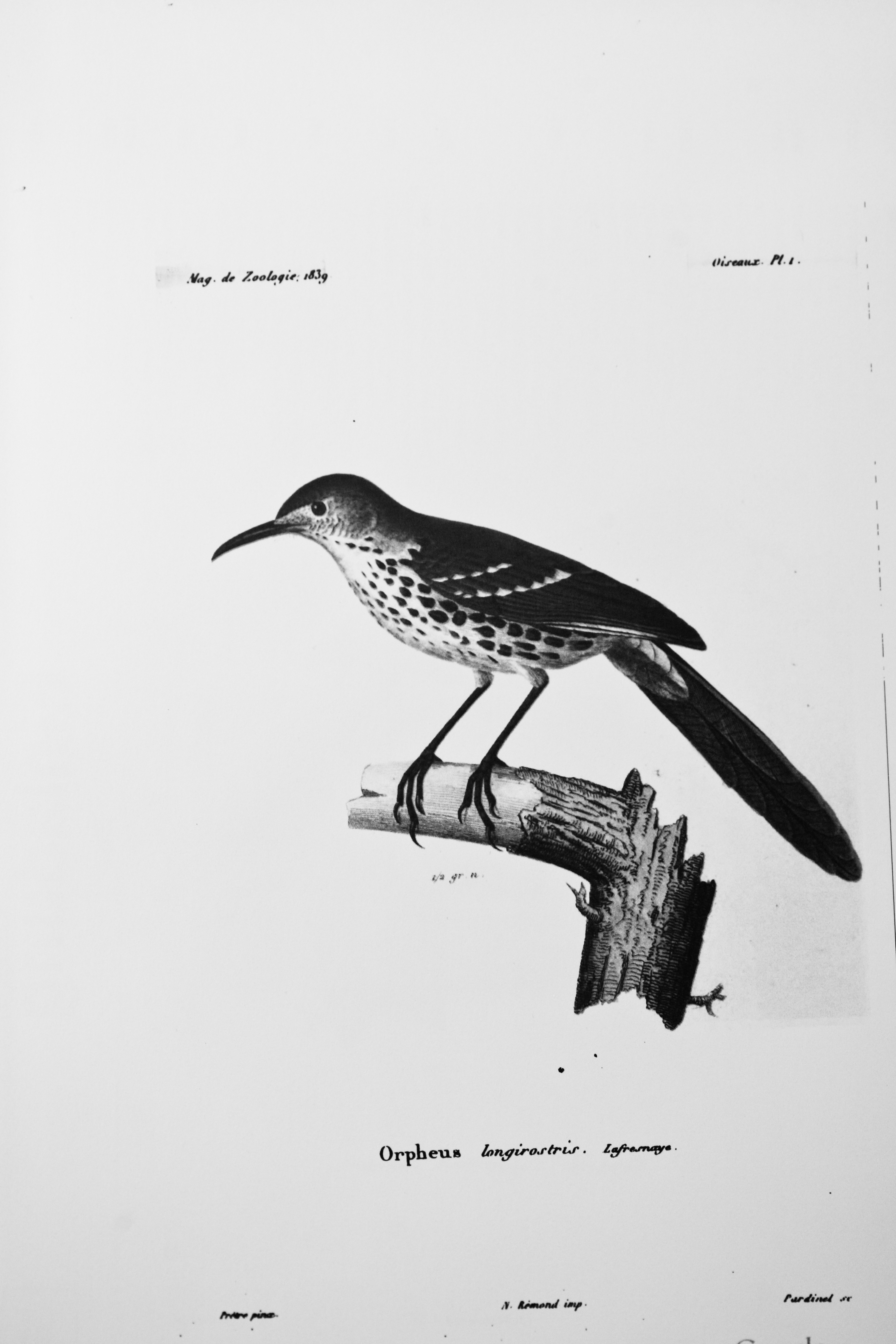 Schwarz-Weiß Zeichnung Langschnabel-Spottdrossel